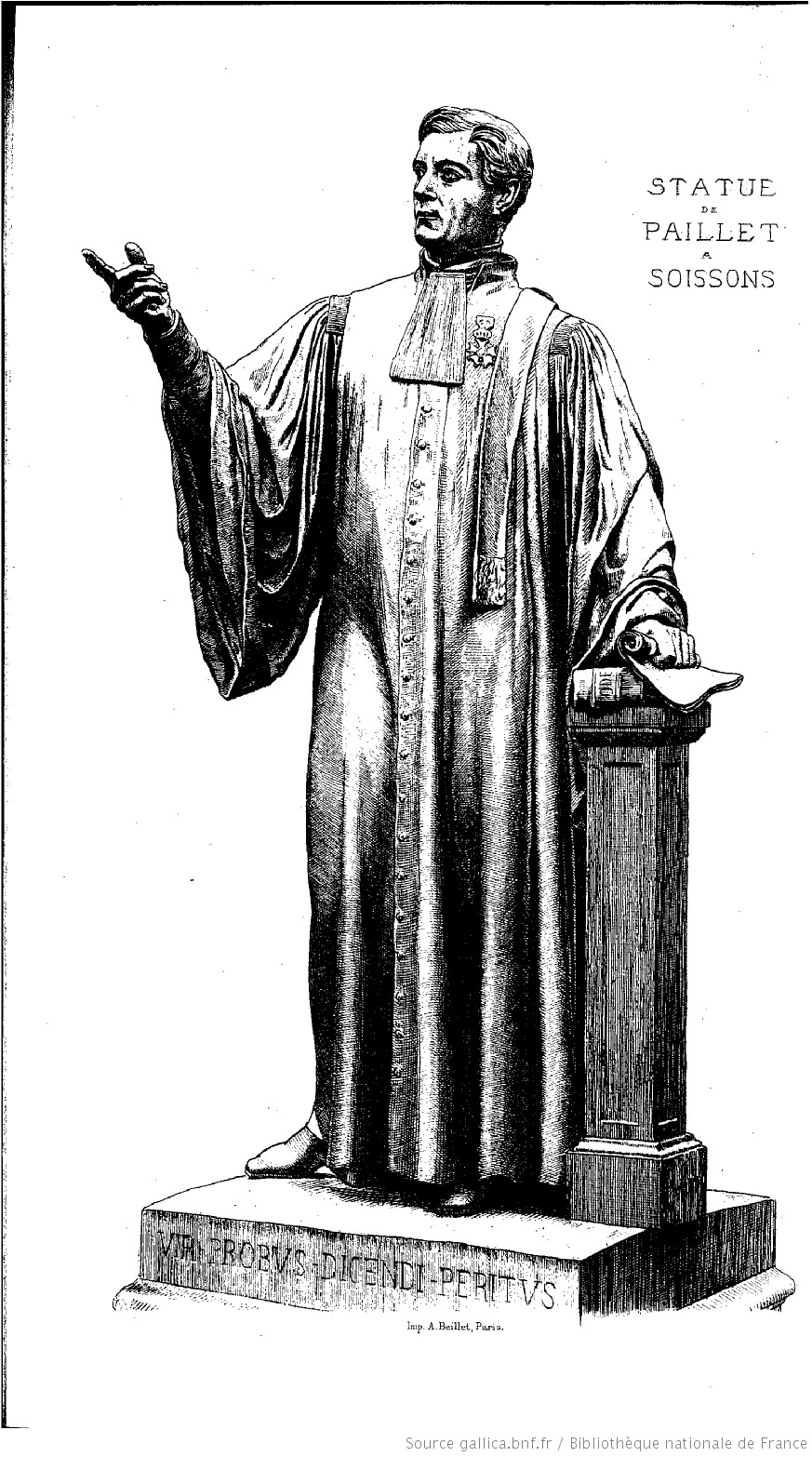 Statue de l'avocat Alphonse Paillet érigée à Soissons en 1863 et détruite en 1942